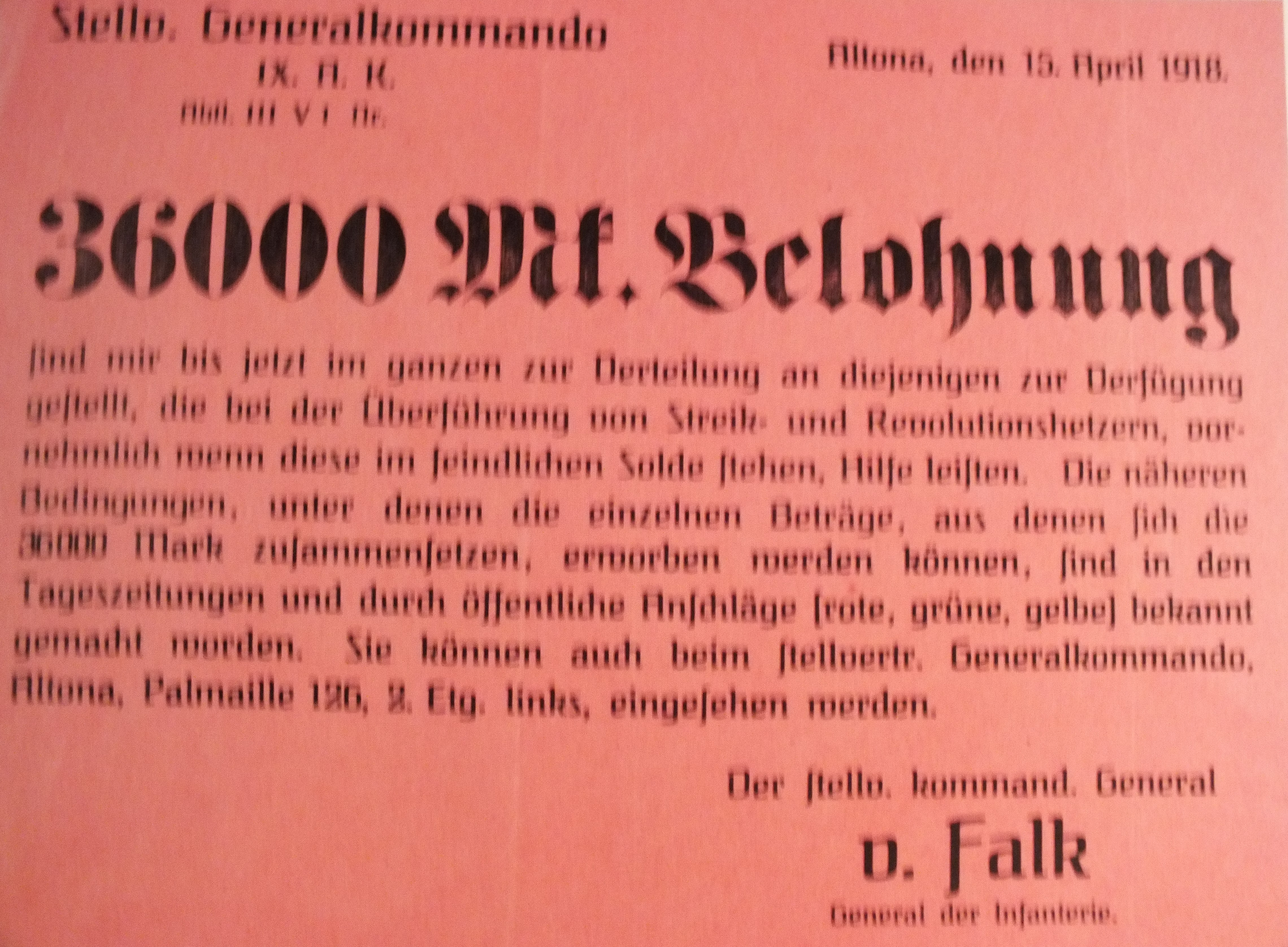 Plakat des Stellvertretenden Generalkommandos IX. Armeekorps in Altona vom 15.4.1918 unter Adalbert von Falk